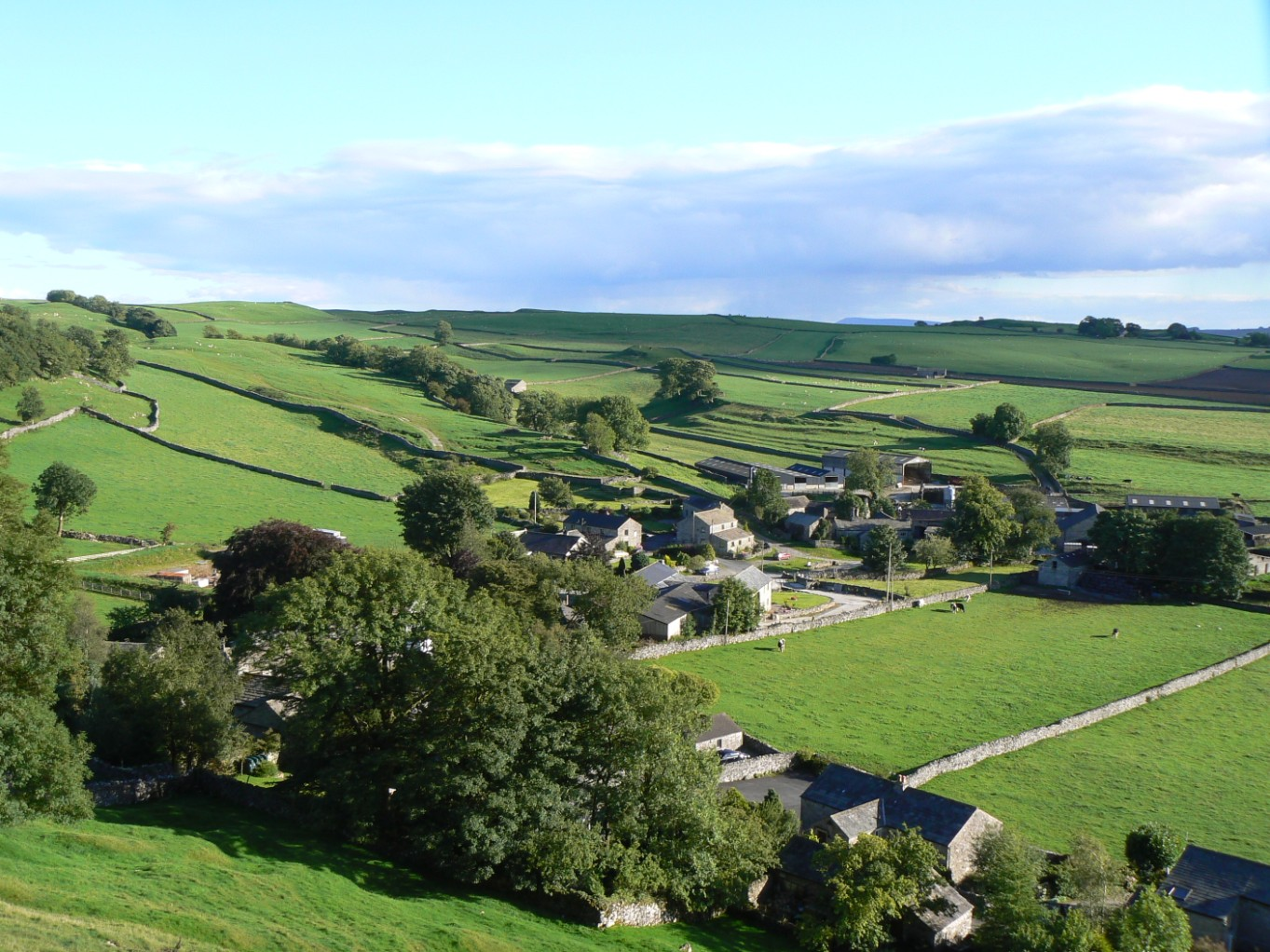 Feizor